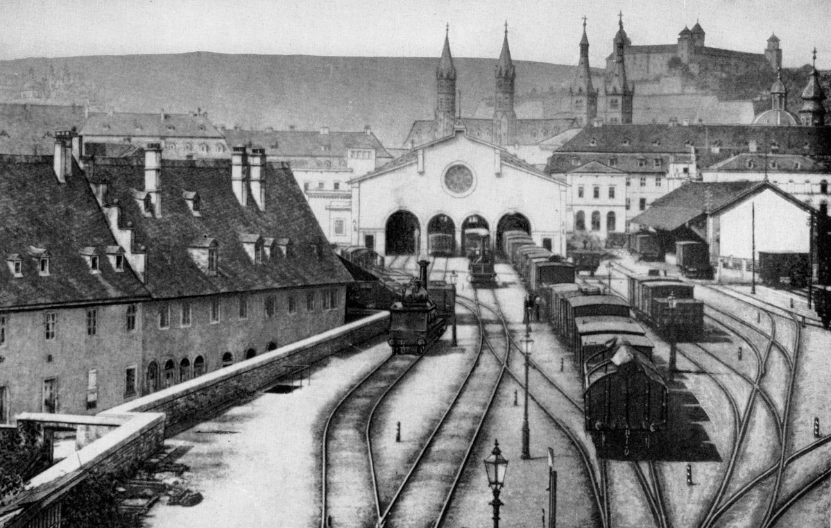 Ludwigsbahnhof (Rückseite)